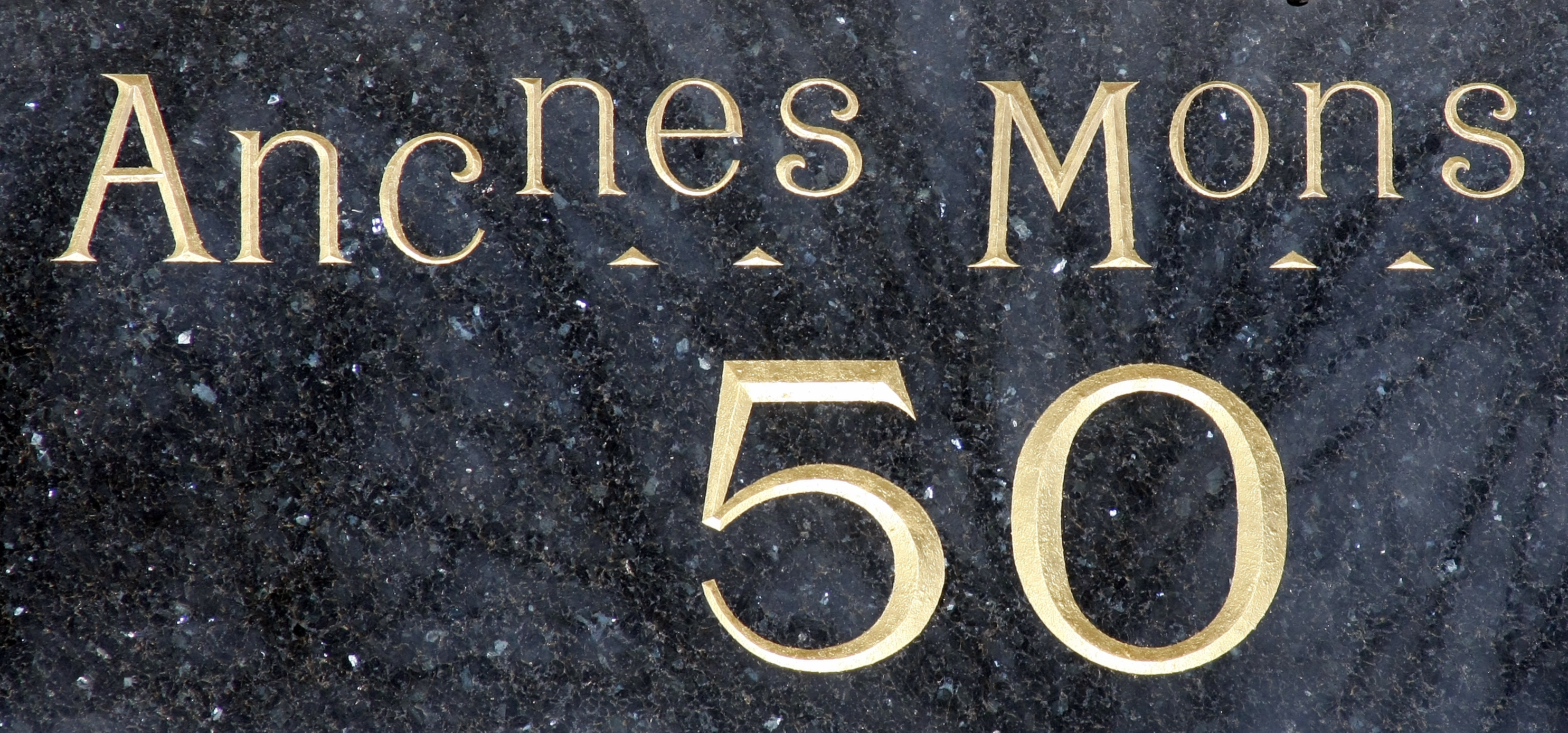 Bd Edgard Quinet